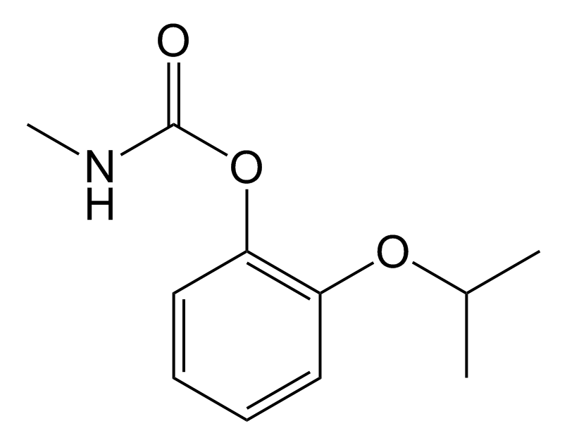 Propoxur